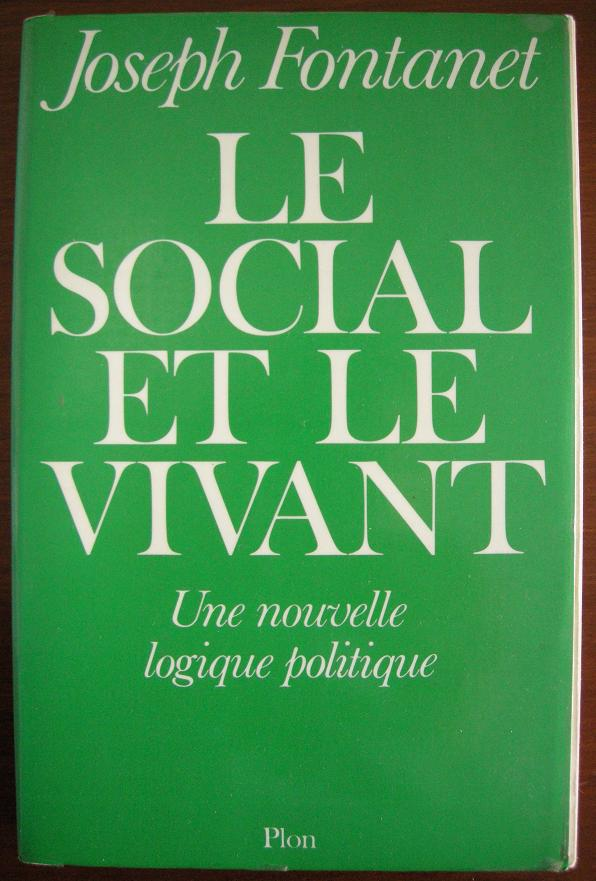 "Le social et le Vivant", livre de Joseph Fontanet, Plon, 1970.